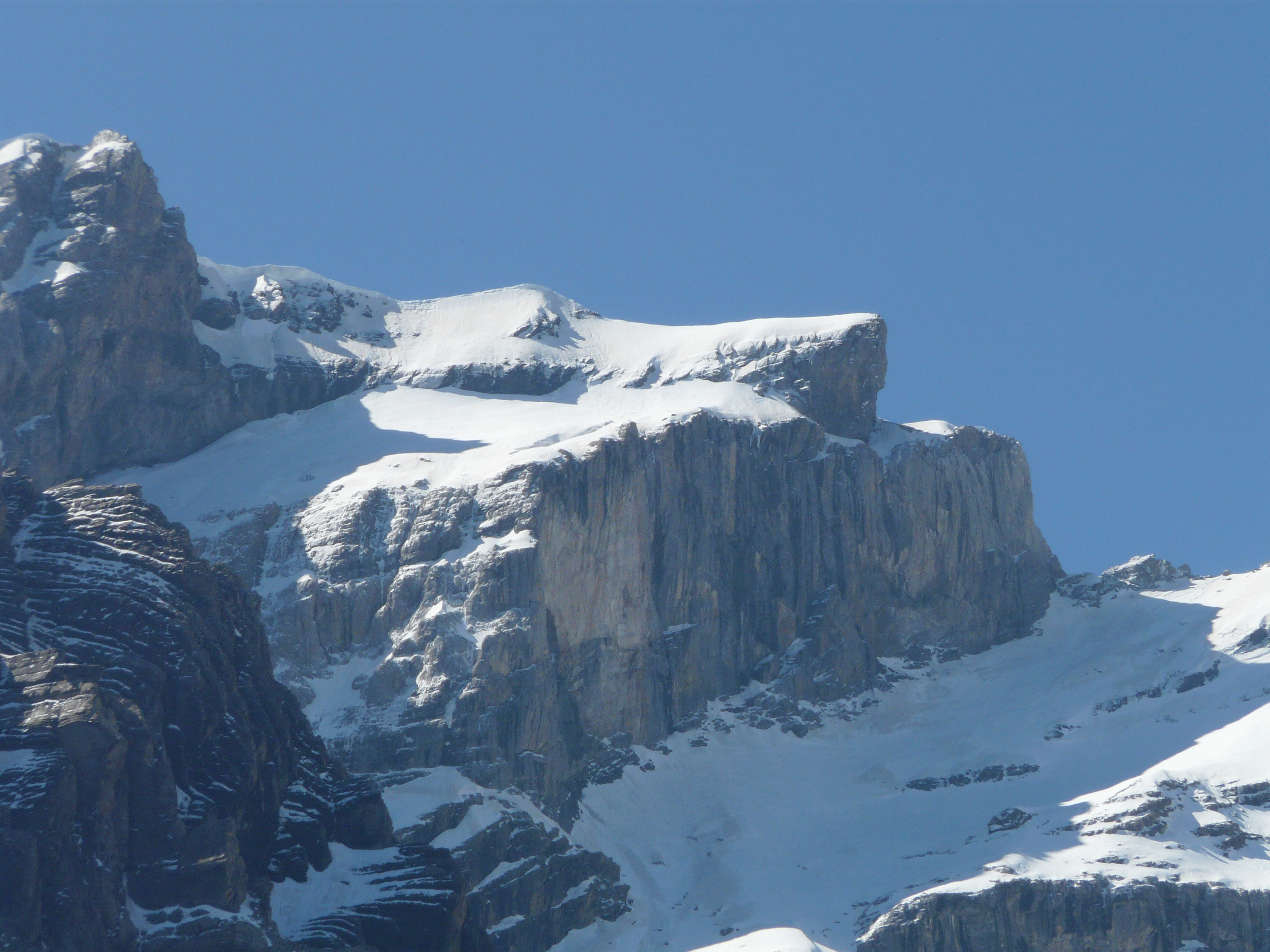 L'Épaule (3073 m), Cirque de Gavarnie, Hautes-Pyrénées, France.